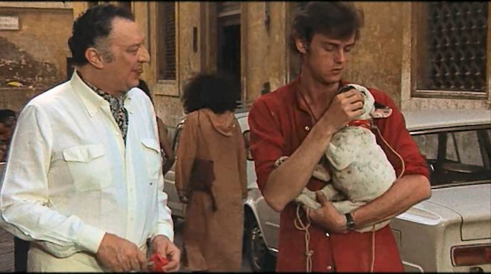 Screenshot del film Trastevere (1971) di Fausto Tozzi